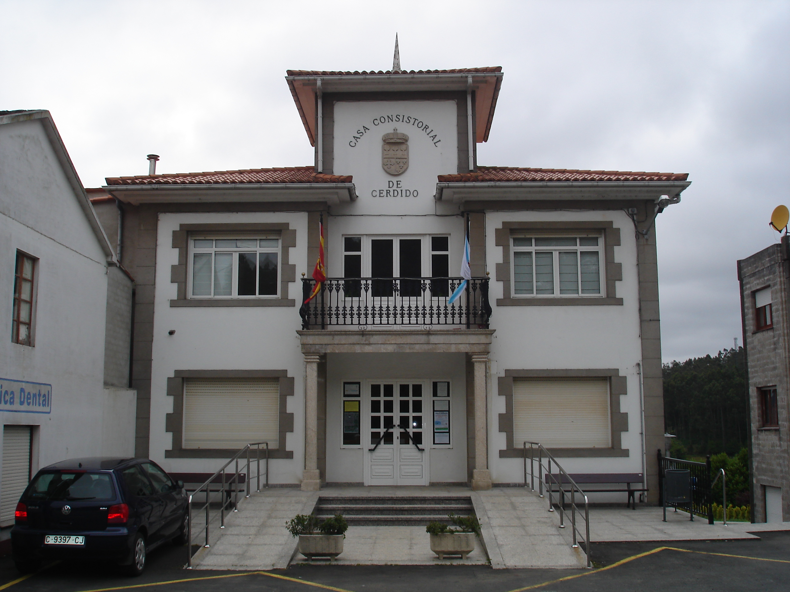 Casa do Concello de Cerdido